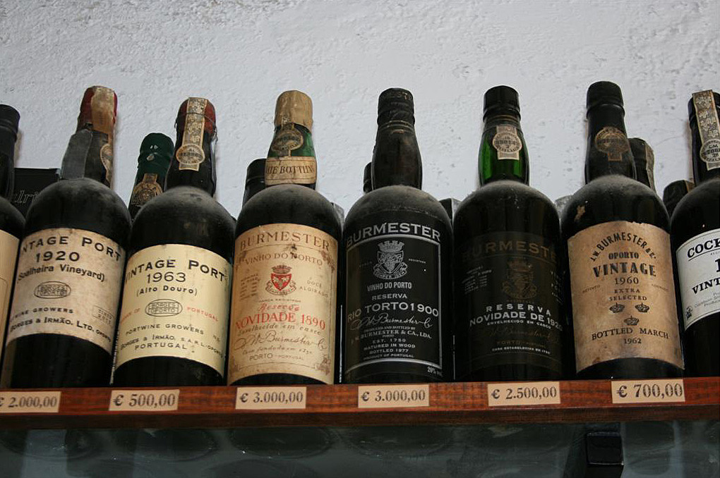 Various vintage Ports